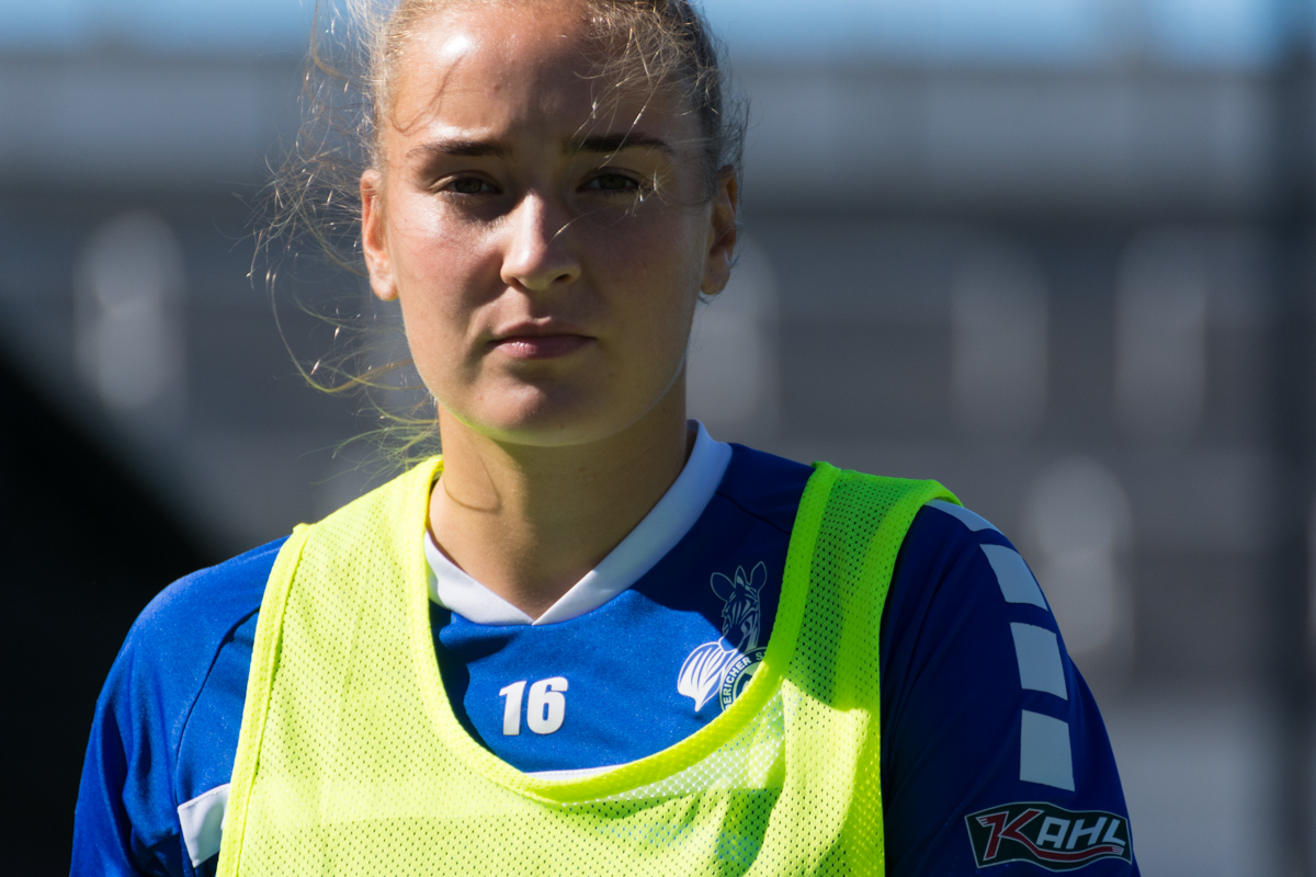 Carolin-Sophie Härling